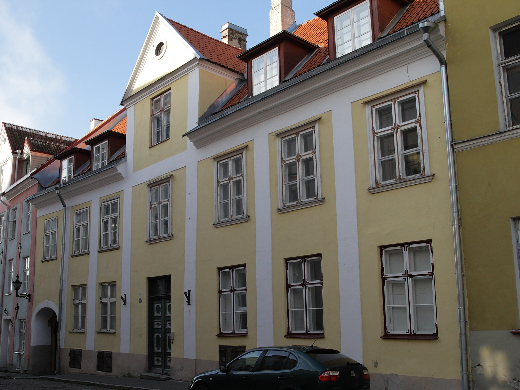 Tallinn, elamu Toom-Kooli 7, 15.-18.saj